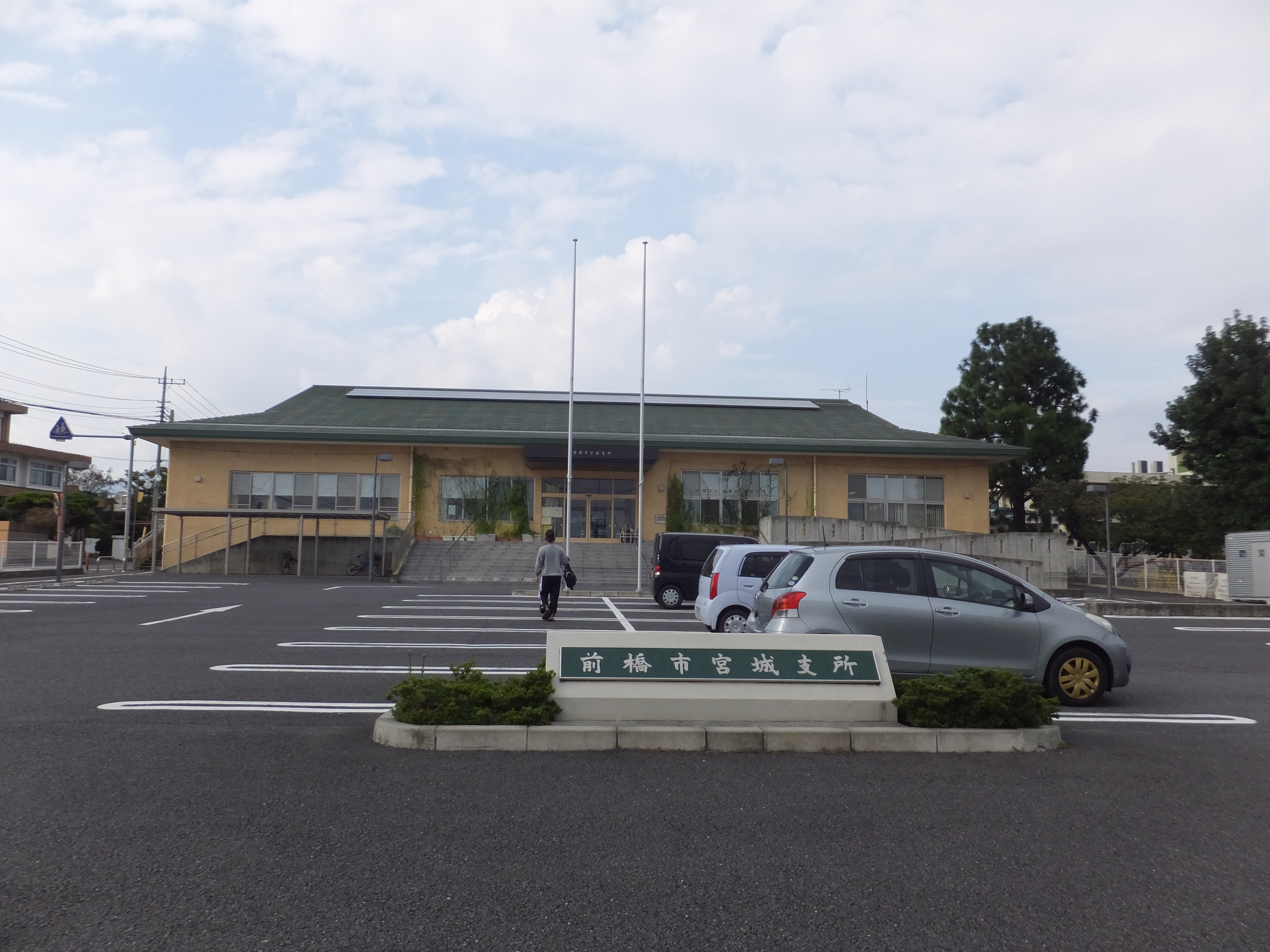 群馬県前橋市鼻毛石町にある前橋市役所宮城支所